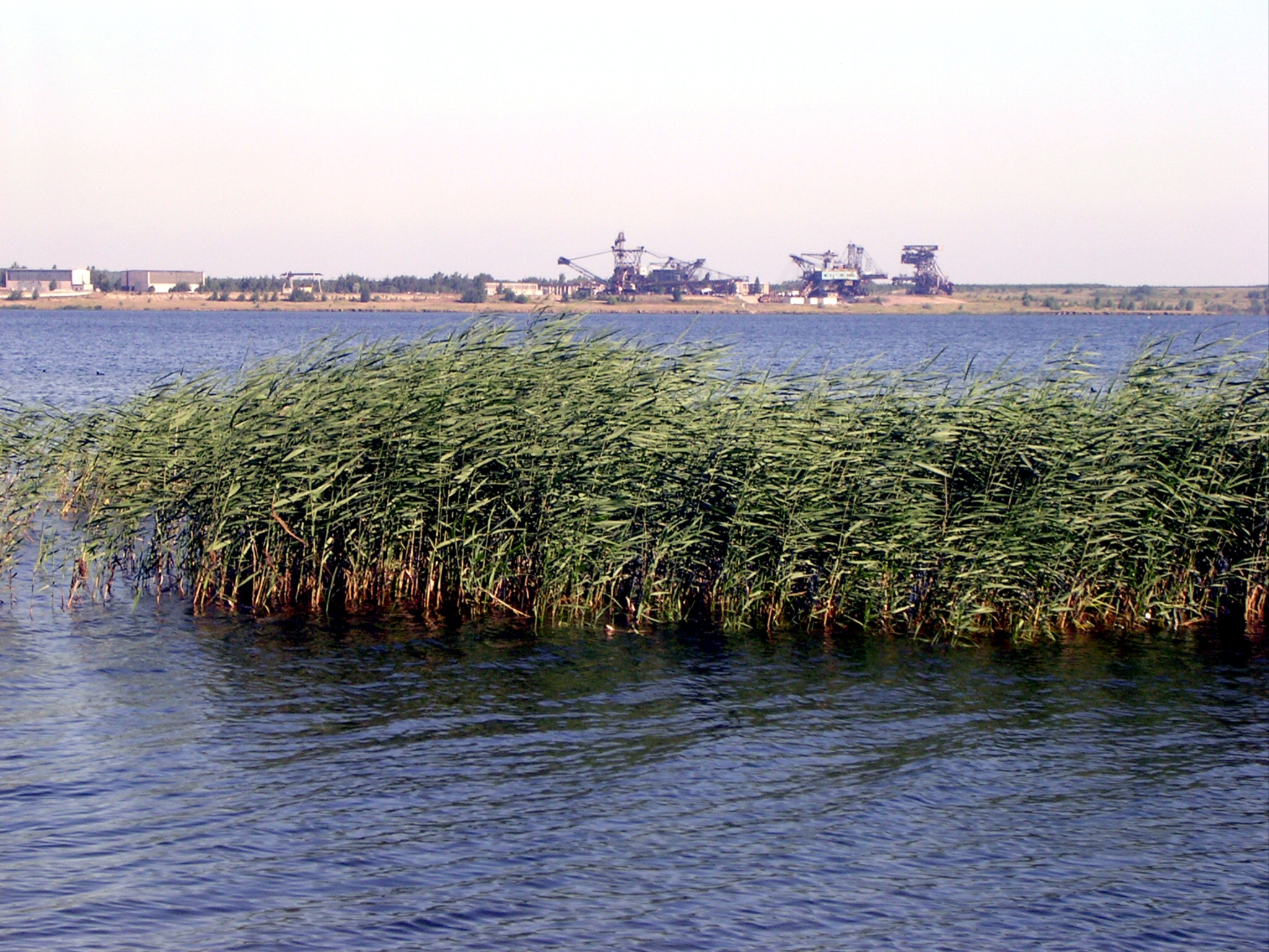 Blick von der Gremminer Brücke in Gräfenhainichen auf Ferropolis